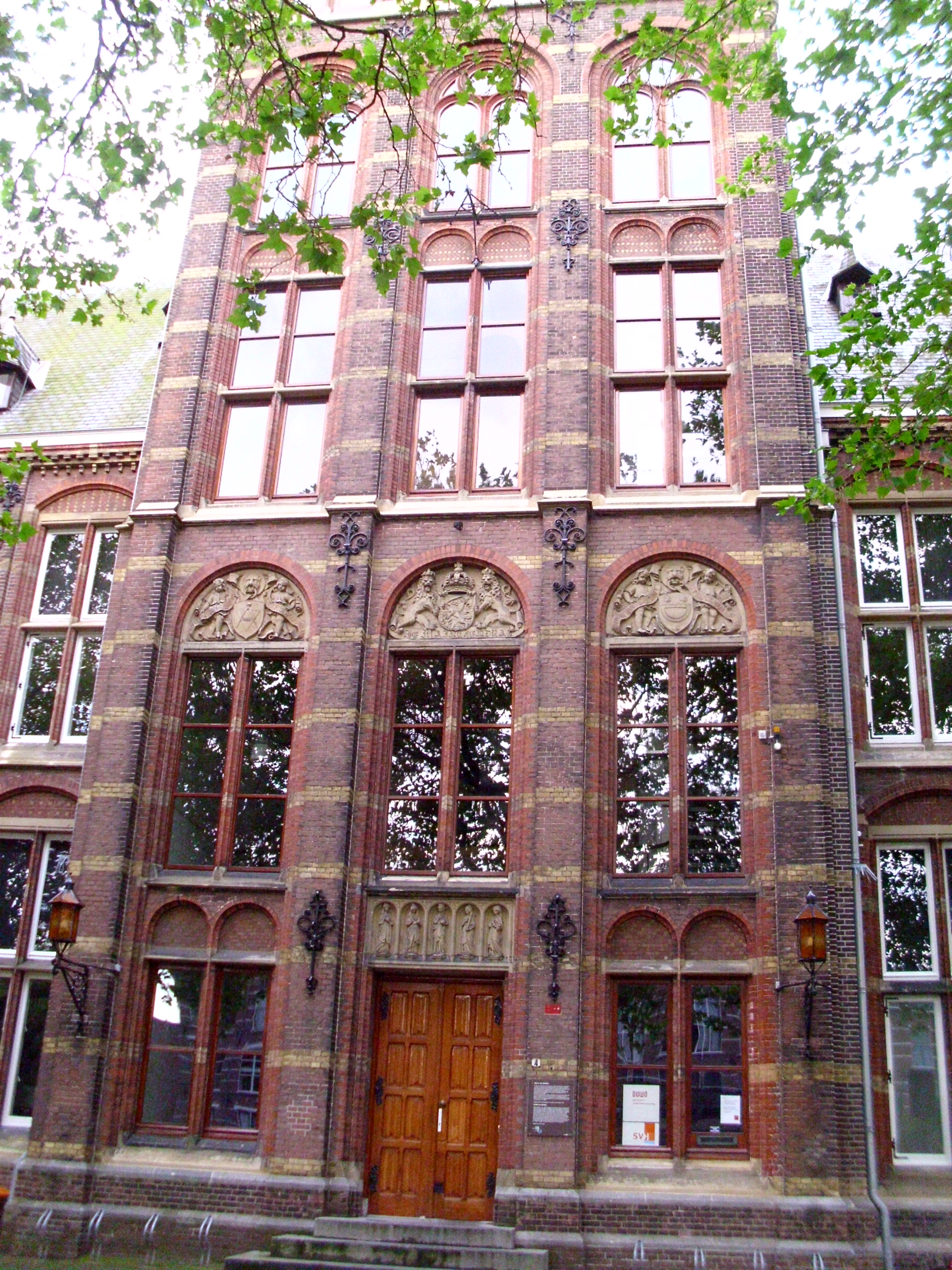 Kanaalweg 4, Delft (See also: File:Building Delft 001.JPGFile:Building Delft 002.JPG )